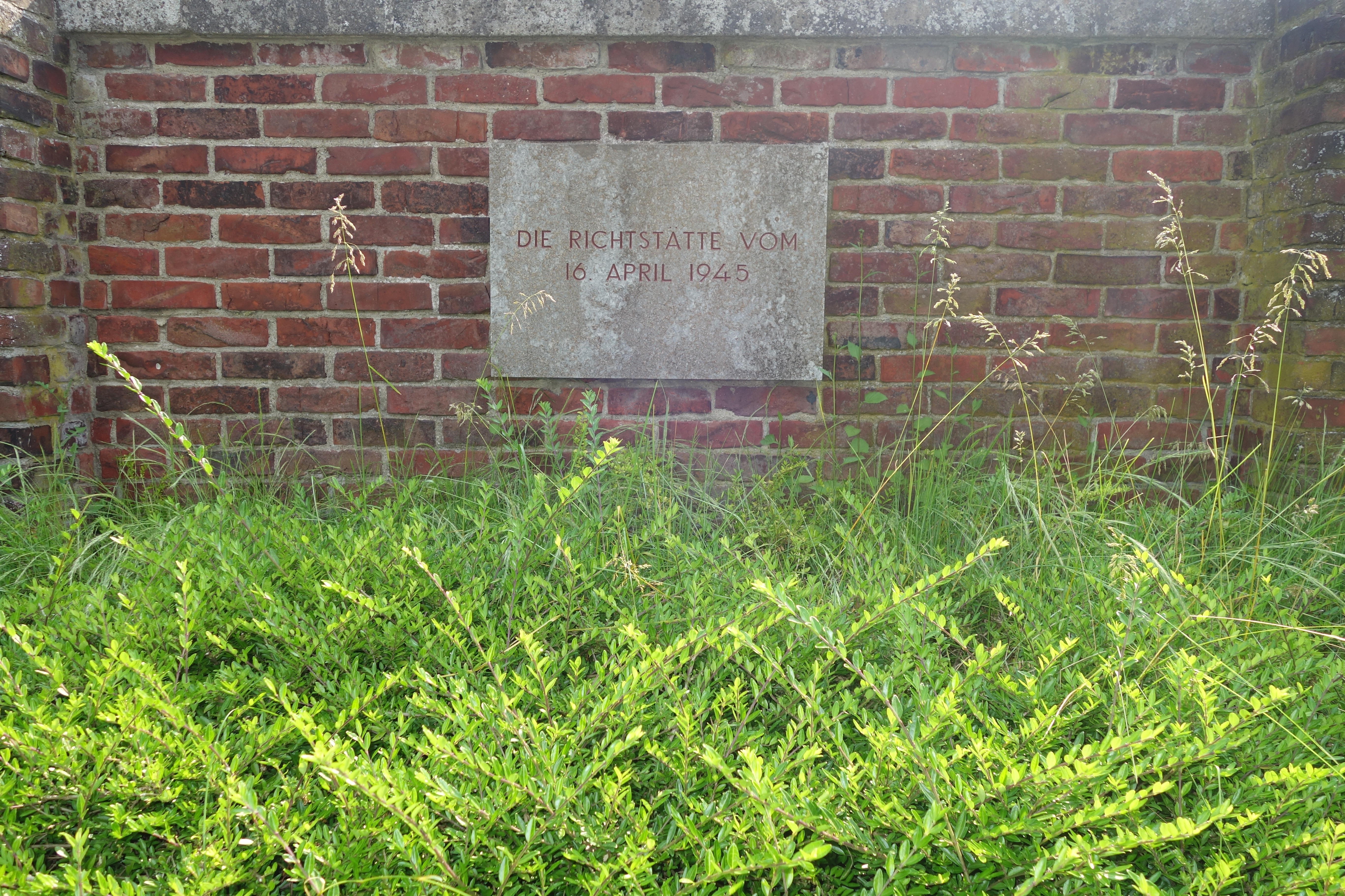 Mahnmal Aktion Rheinland, Anton-Betz-Straße, Düsseldorf.